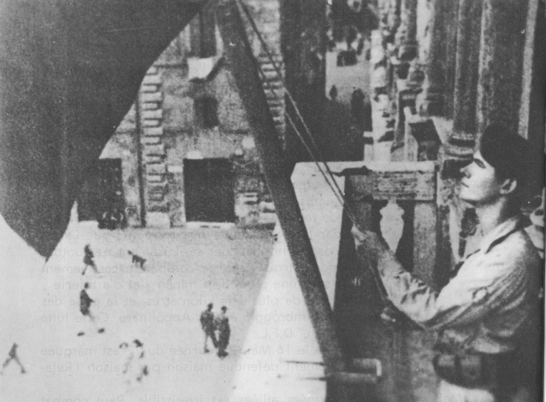 Photo représentant Paul Poggionovo lors du hissage du drapeau français au palais Farnèse en Italie